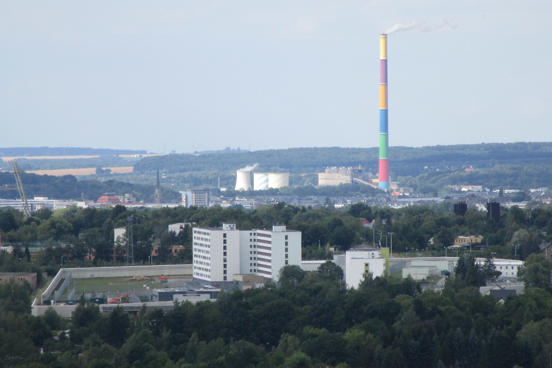 Blick zum Heizkraftwerk Nord in Chemnitz mit dem von Daniel Buren farbig gestalteten 301,80 m hohen Schornstein